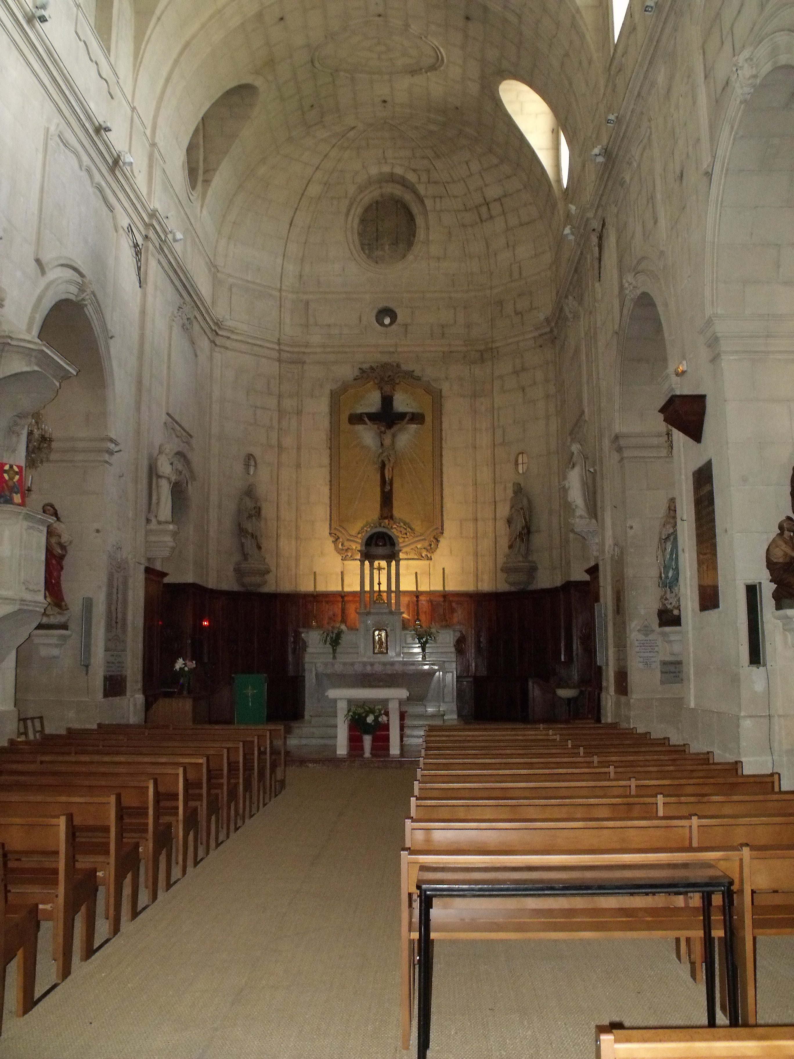 43°43′16.3″N 4°48′19.8″E / 43.721194°N 4.8055°E